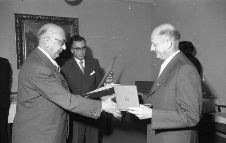 Staatssekretär Sonnemann überreicht Diplome an Fleischwarenfabrikant